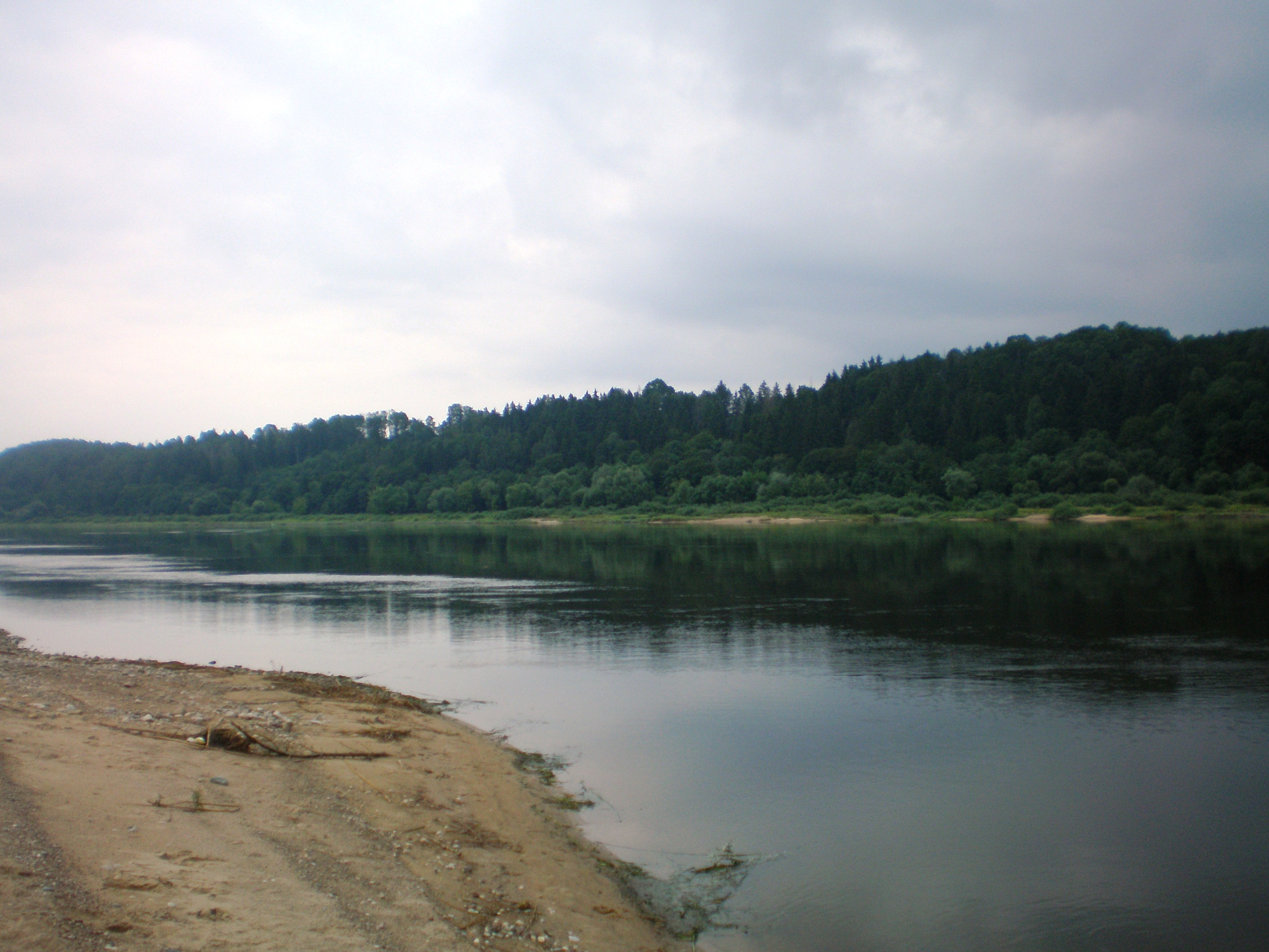 Neman river near Veliuona